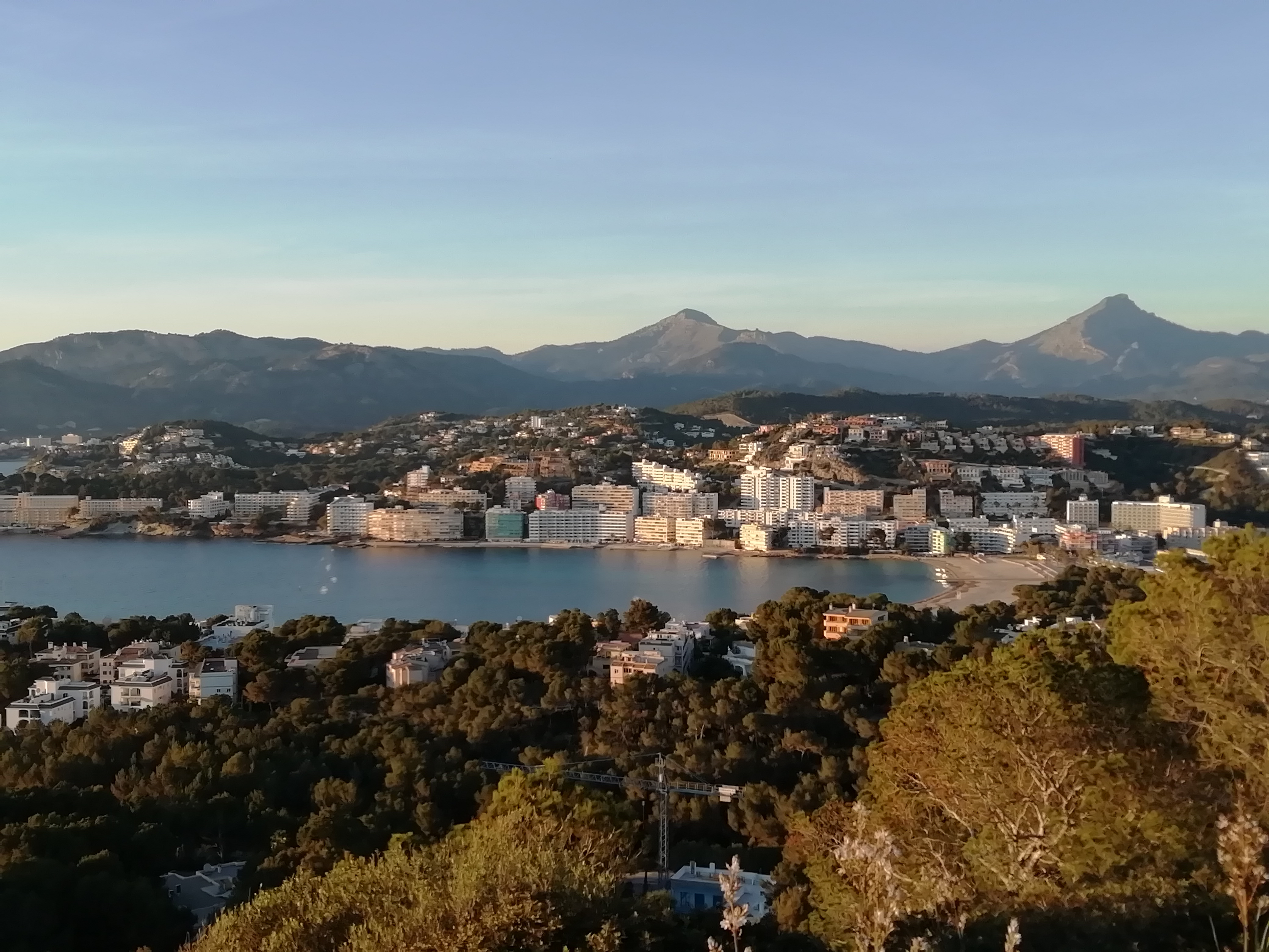 Vista panorámica del núcleo de población Santa Ponsa, Mallorca.